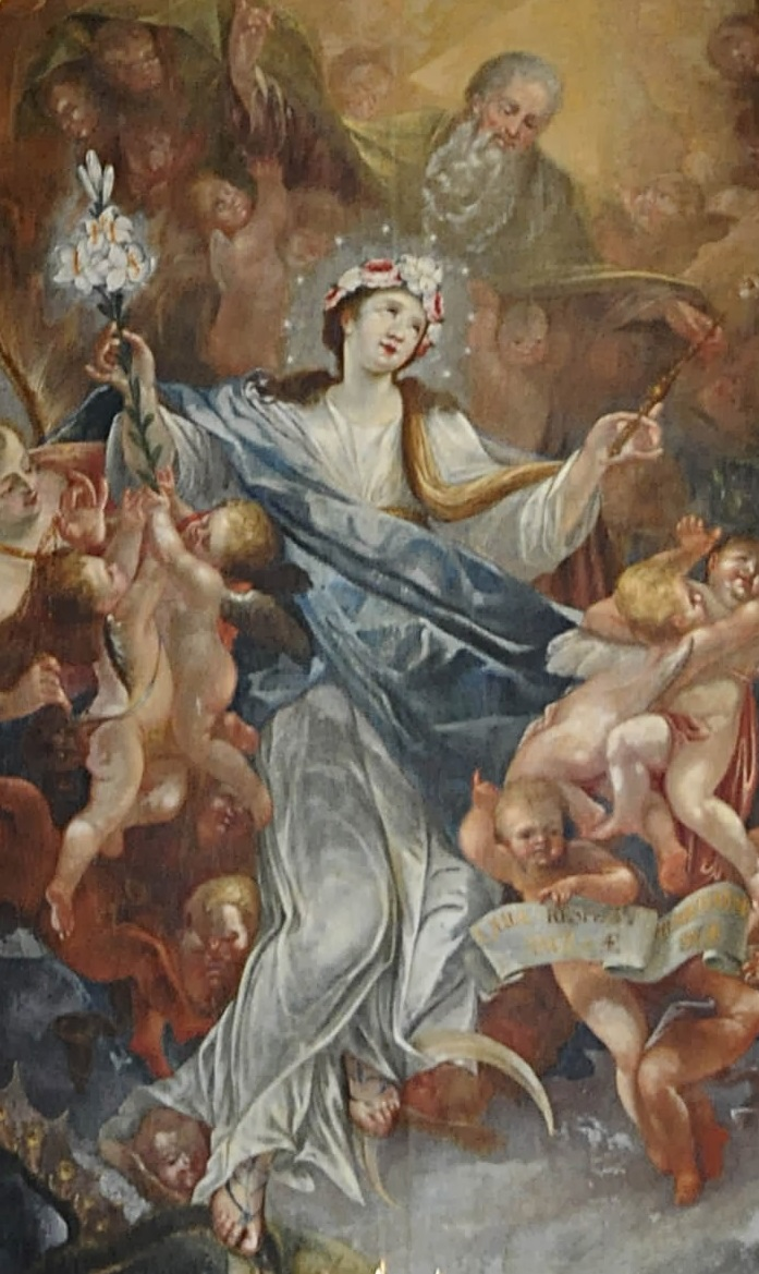 Valentin Reuschl (1717): Hochaltarbild Apokalyptische Frau, kath. Kirche St. Johann Baptist, Burgkirchen